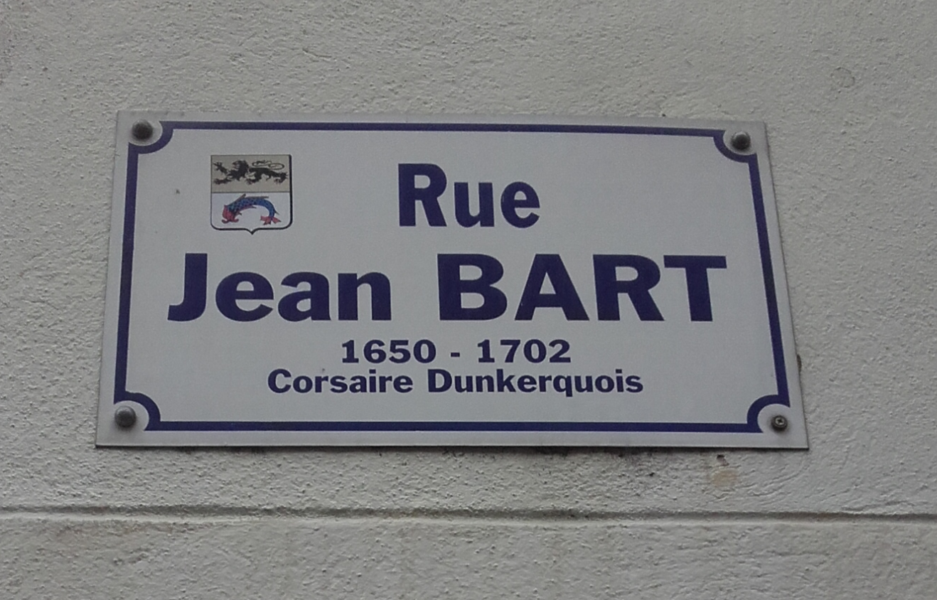 Plaque de rue Jean Bart à Dunkerque